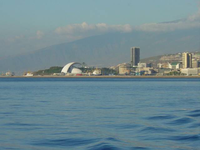 Santa Cruz de Tenerife desde el mar